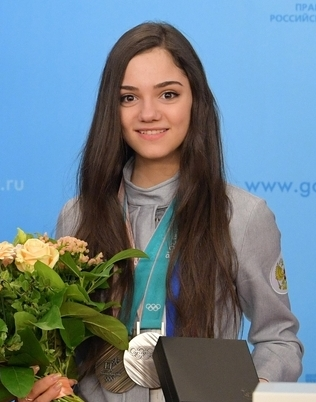 С серебряной медалисткой XXIII Олимпийских зимних игр 2018 года в Пхёнчхане в индивидуальных соревнованиях по фигурному катанию Евгенией Медведевой